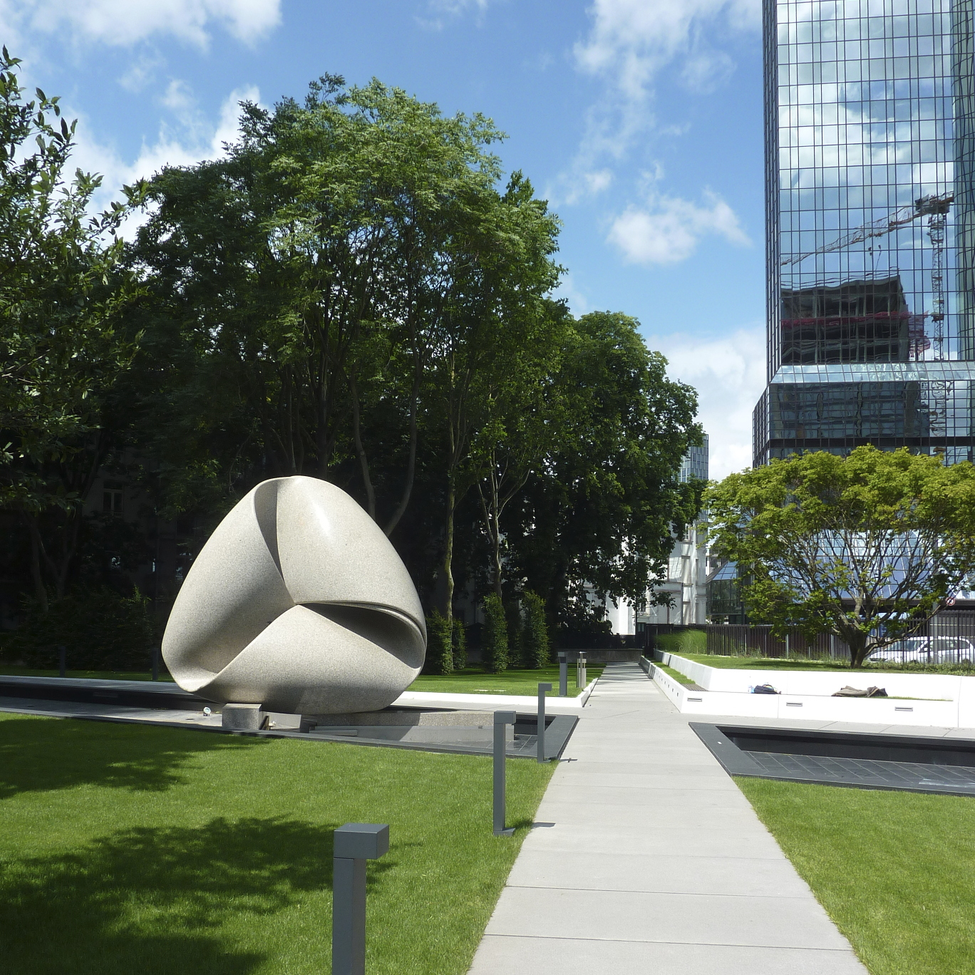 Kontinuität (auch „Koloss von Frankfurt“) ist eine 1986 vollendete Skulptur des schweizer Bildhauers Max Bill (1908–1994). Das Kunstwerk, das mit 80 Tonnen Gewicht zu den schwersten Granitskulpturen der Welt zählt, steht in der deutschen Stadt Frankfurt am Main an den Hochhaus-Zwillingstürmen der Deutschen Bank. In den Jahren 2007 und 2011 wurde die Skulptur jeweils um einige Meter von ihrem ursprünglichen Standort im Vorhof der beiden Hochhäuser versetzt; Ihr gegenwärtiger Standort ist eine Grünanlage neben der Deutsche-Bank-Zentrale